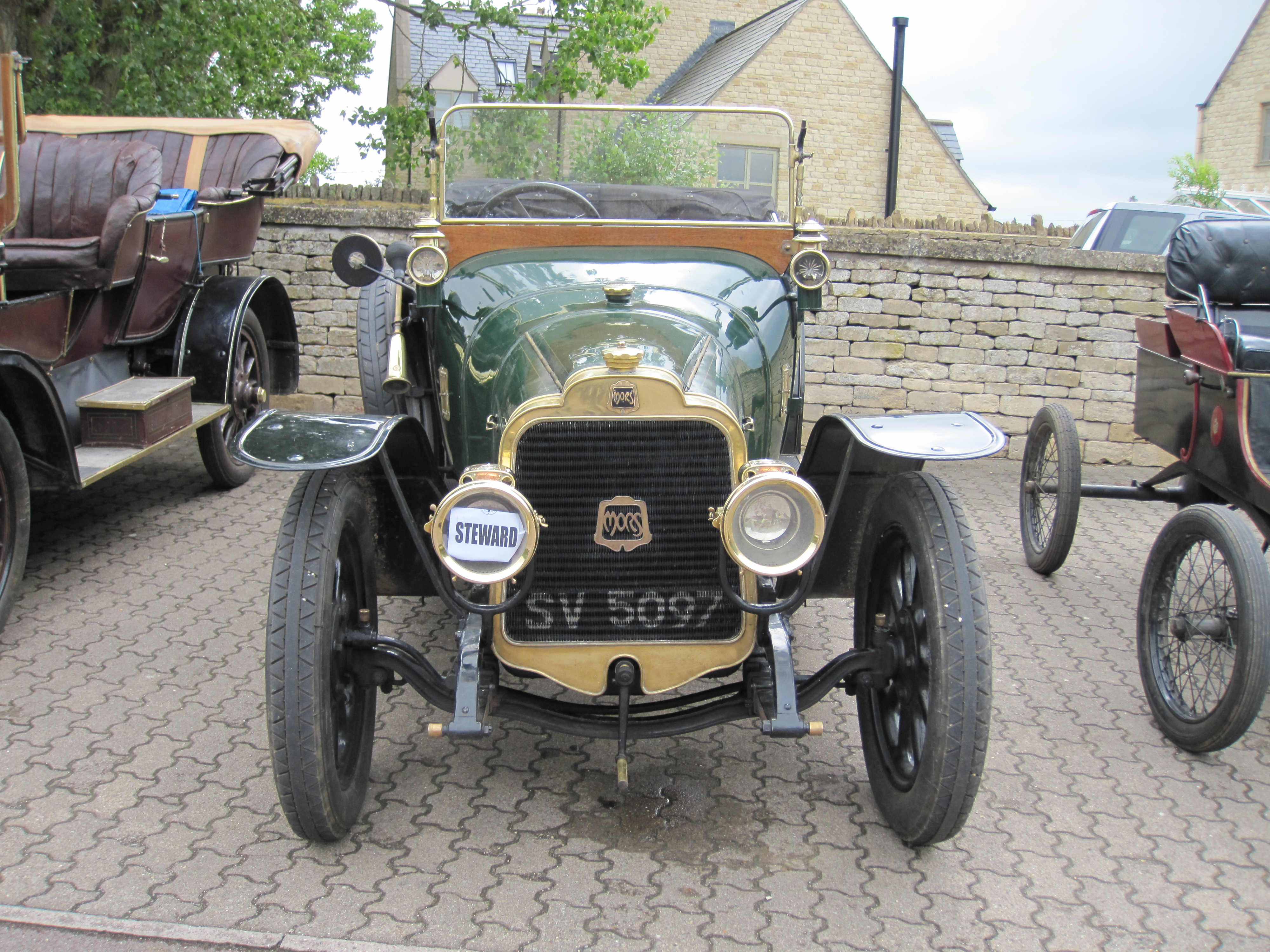 1913 Mors 12/15 (DVLA) made 1913, 2116 cc